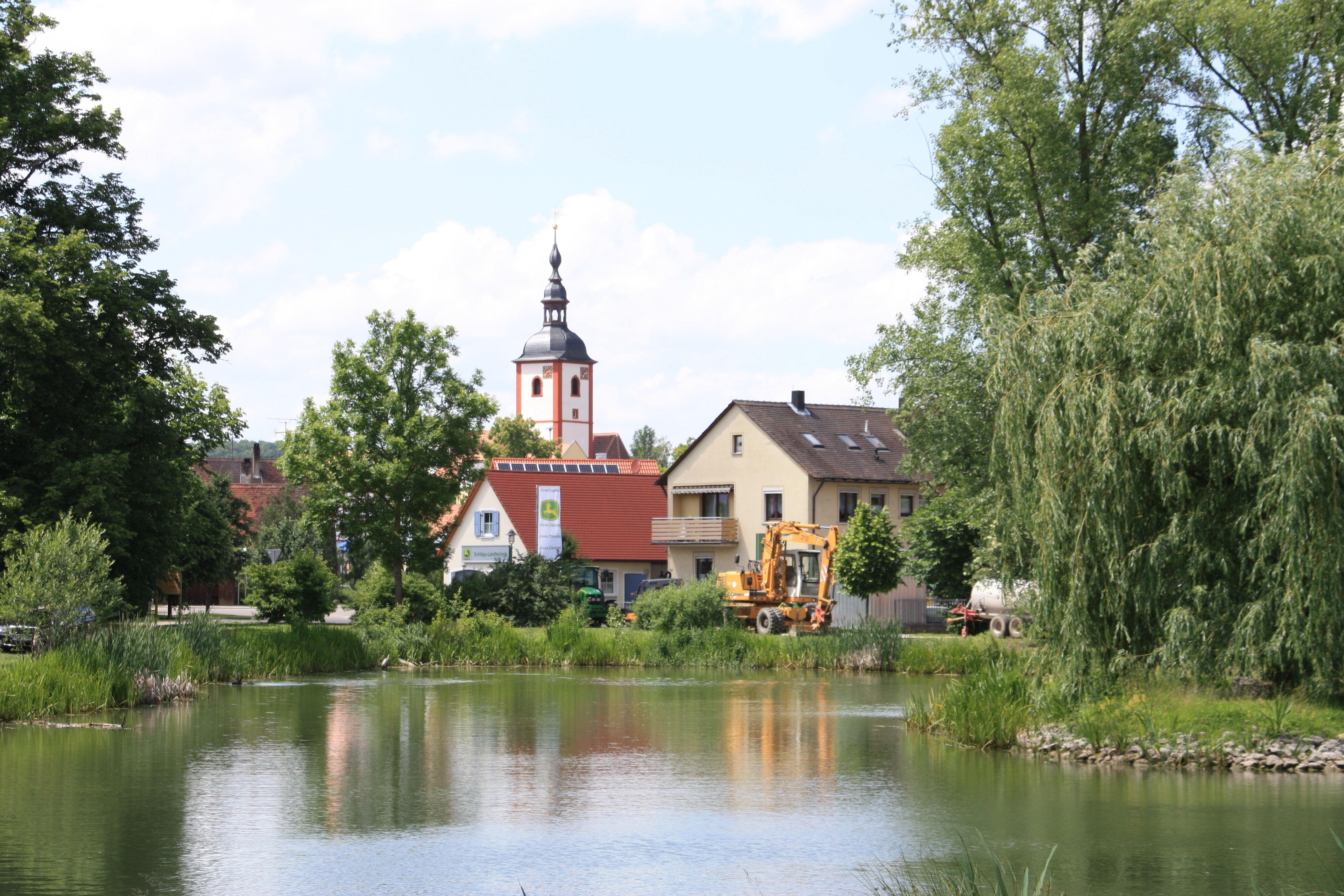 Ortsmitte